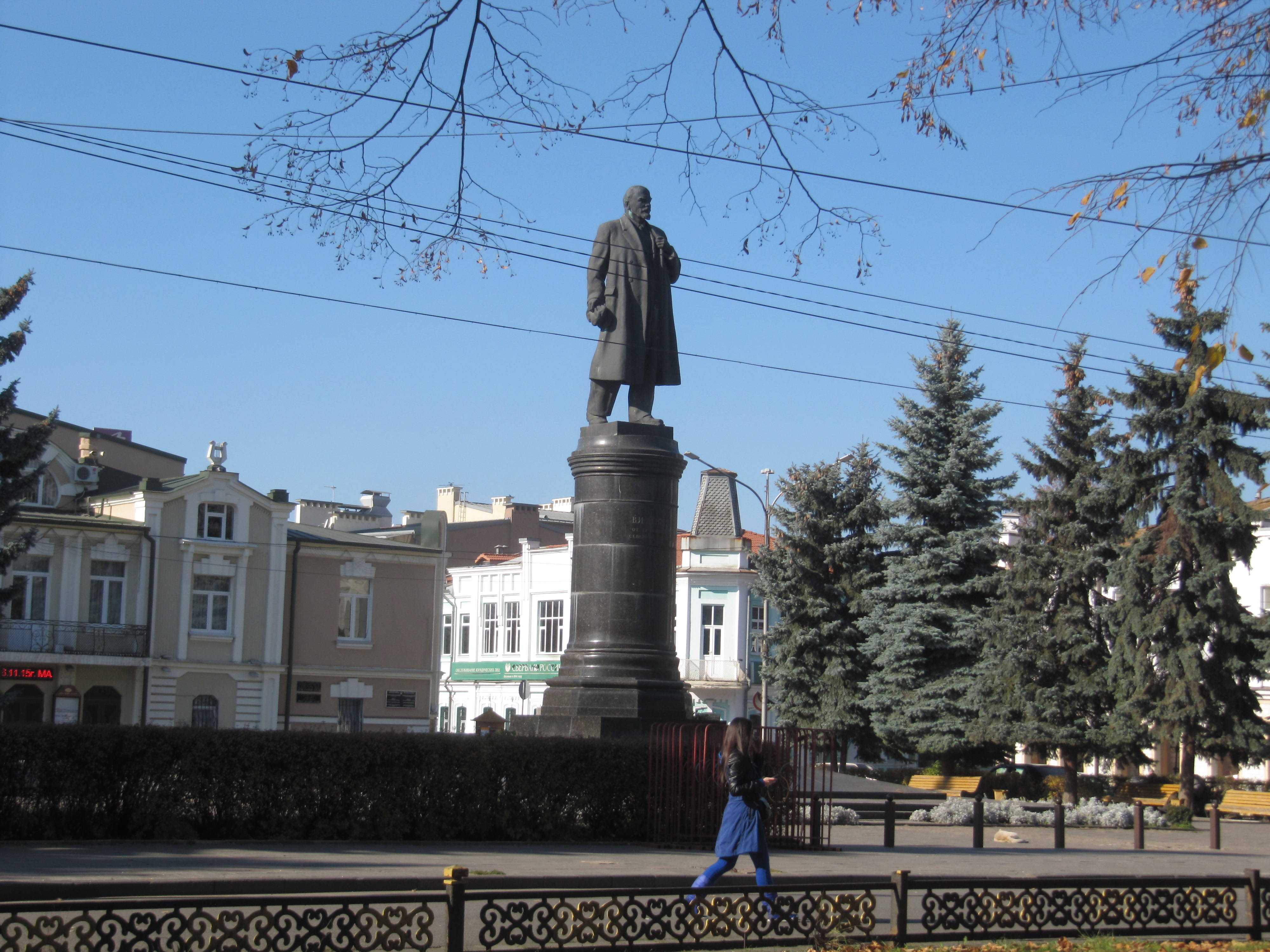 Памятник Ленину на площади Ленина